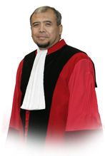 Dr. H. Patrialis Akbar, S.H., M.H. Hakim Konstitusi